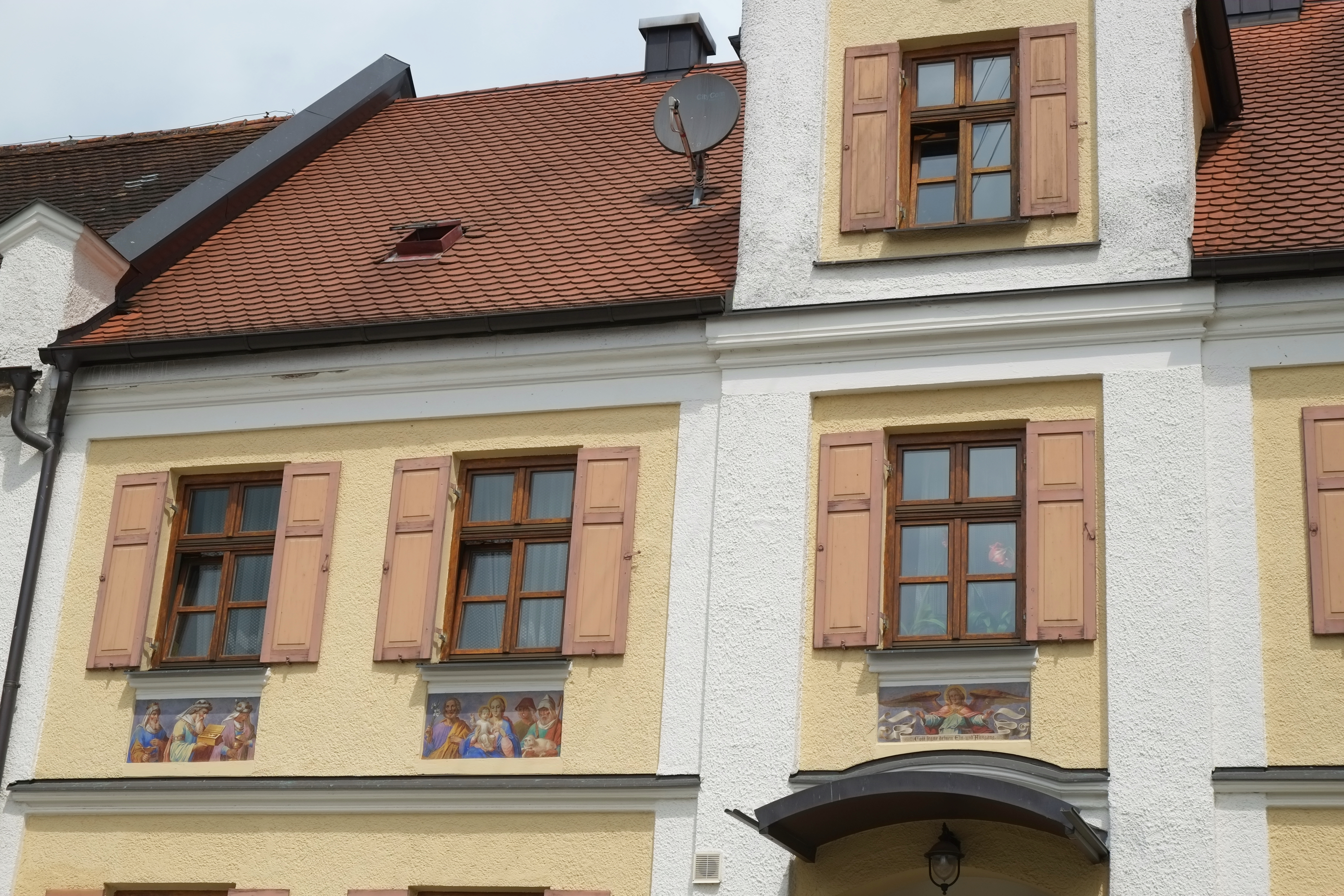 Haus der Malerfamlie Scherer, Von-Schnurbein-Straße 28, in Ettelried, einem Ortsteil von Dinkelscherben im Landkreis Augsburg (Bayern)